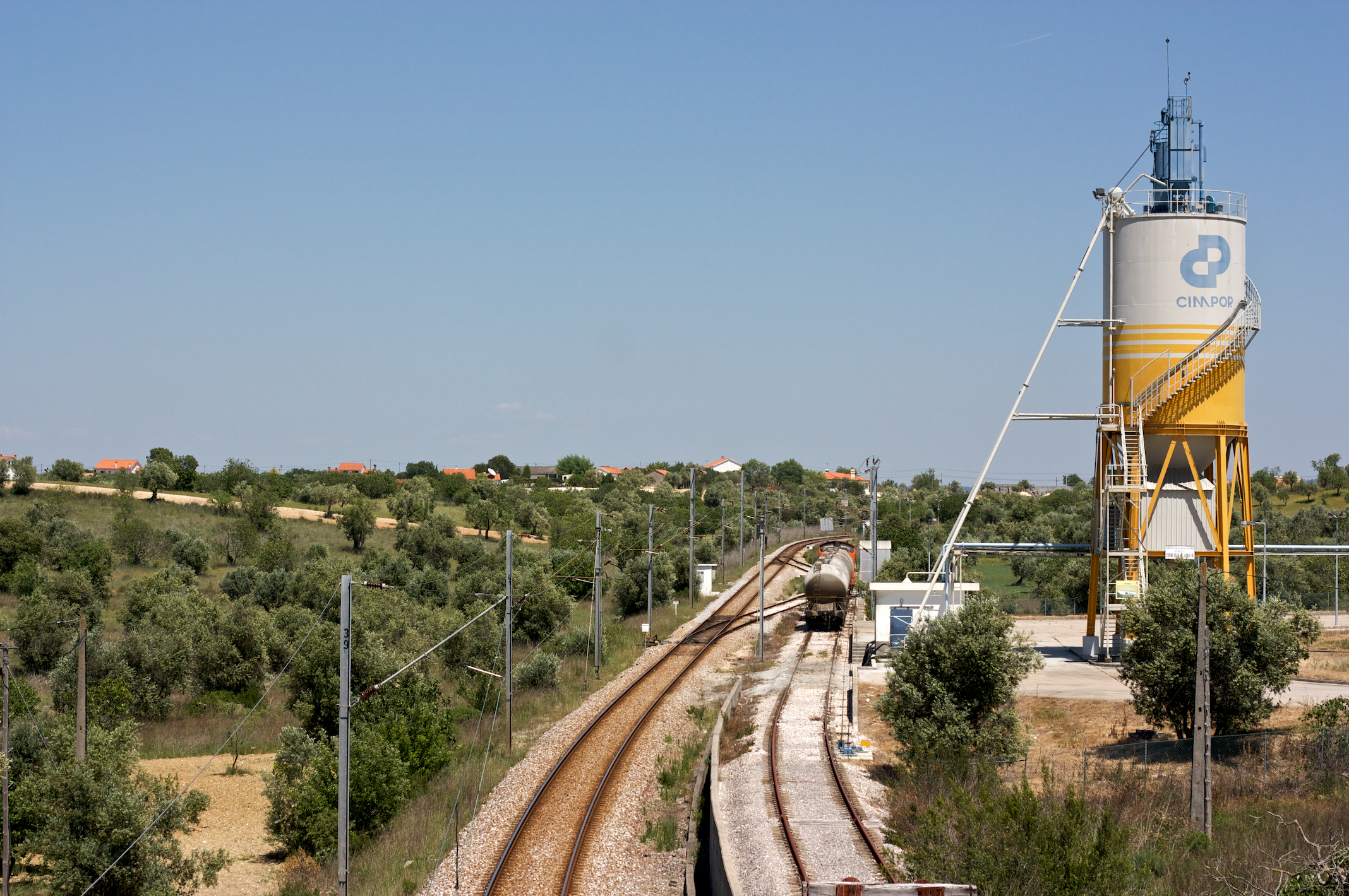 Via férrea: Ramal Lamarosa • Cimpor [Ramal de Tomar, PK 2] Local: Vila Nova Data e hora: 6 de Maio de 2009 [14h21] Sentido: Tomar